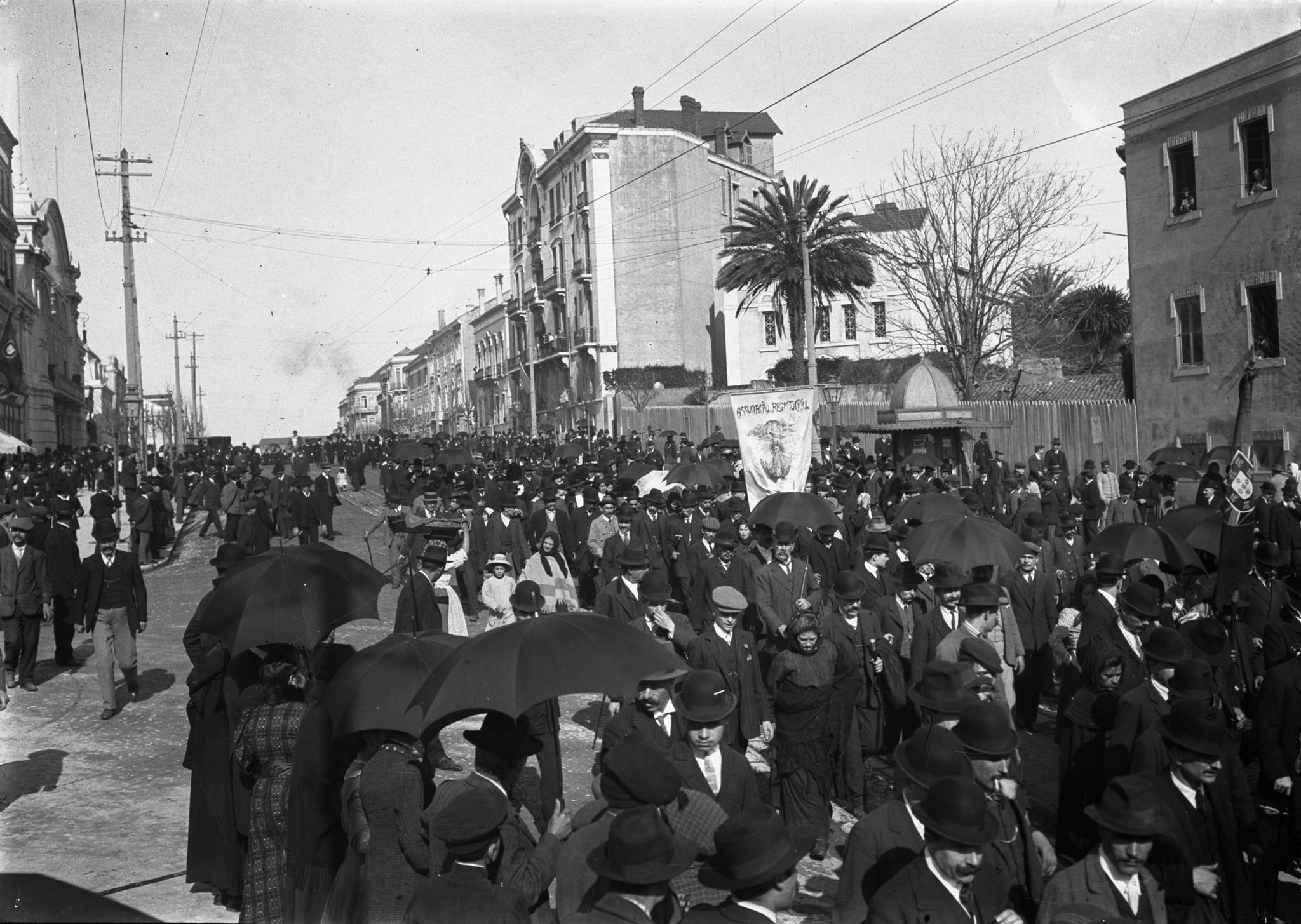 Título: A homenagem a Teófilo Braga, o cortejo Dimensão: 9 x 12 cm Nota de publicação : Ilustração Portuguesa, 1912, 1 de Abril Notas: Inscrição no original: 7723 Assunto: Homenagem / Cortejo / Sinagoga de Lisboa (Lisboa, Portugal) / Quiosque da Av. da Liberdade ft à rua Alexandre Herculano / Alexandre Herculano (rua, Santo António, Lisboa, Portugal) Código de referência: PT/AMLSB/JBN/001456